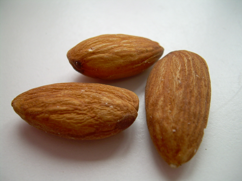 Almonds